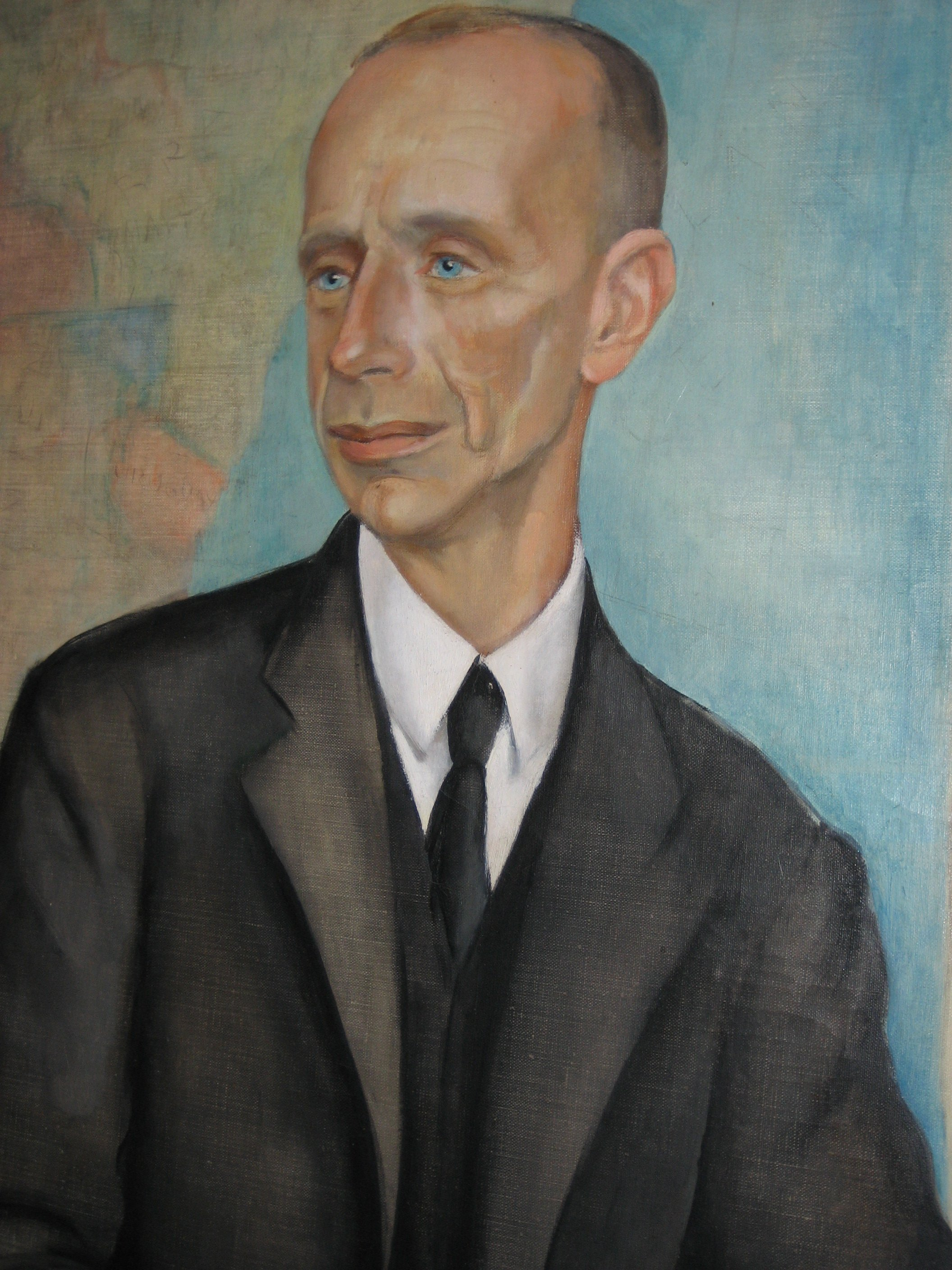 Bildnis des Hamburgischen Senators Wilhelm Amsinck Burchard-Motz (1878 - 1963).